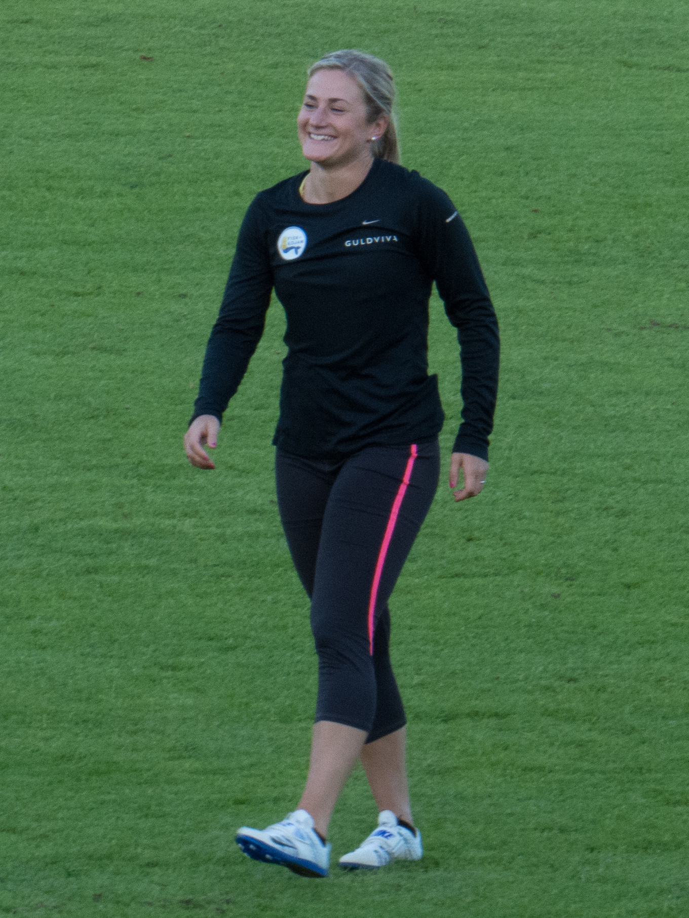 Hanna Wiss, suomalainen pikajuoksija ja pituushyppääjä vuonna 2016.